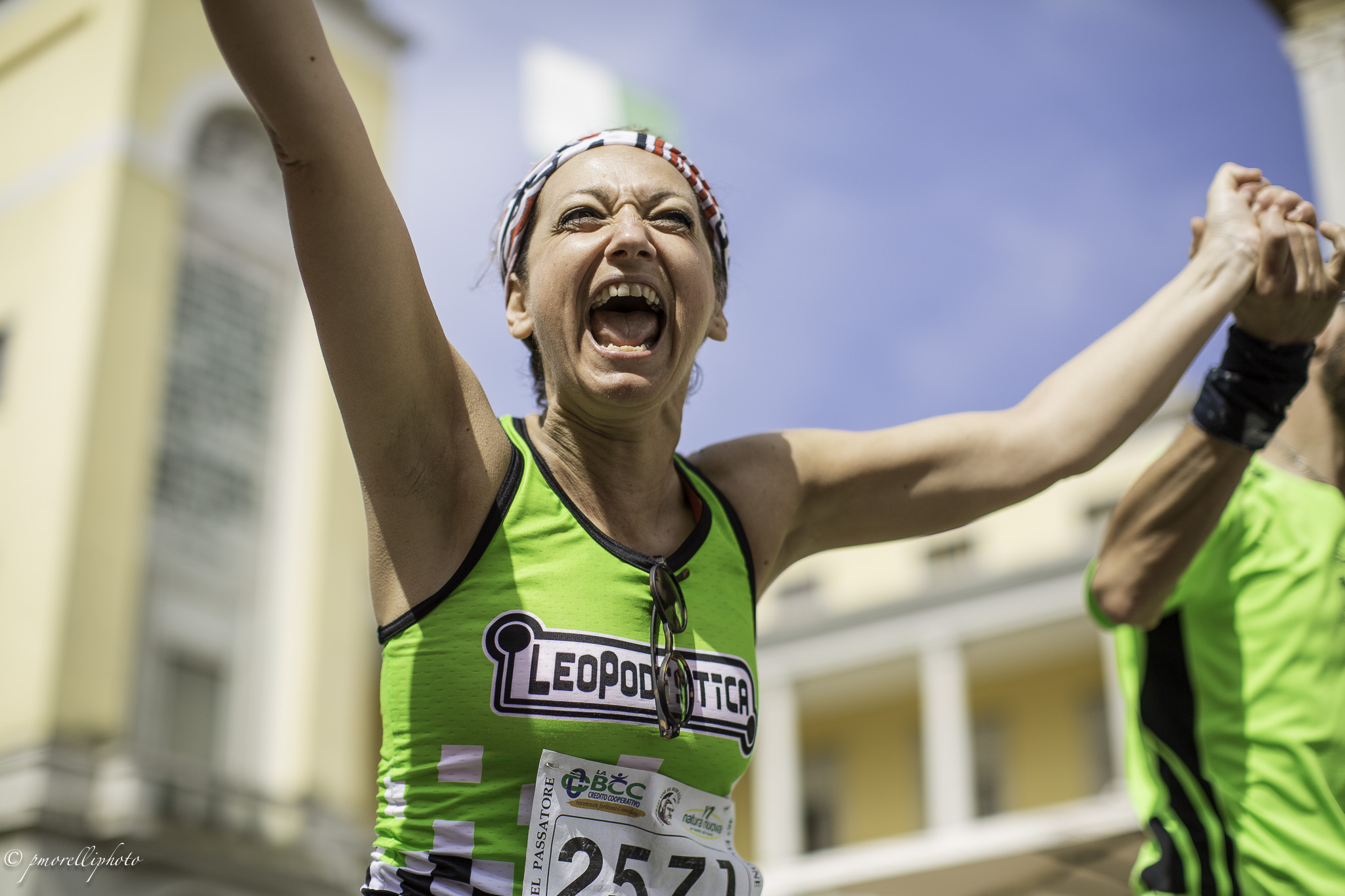 Arrivo a Faenza di Romina, una delle centinaia di concorrenti che grazie alla grande tenacia mentale è riuscita a portare a termina una gara così impegnativa.